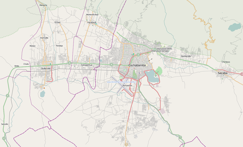 Area Metropolitana de Cochabamba.